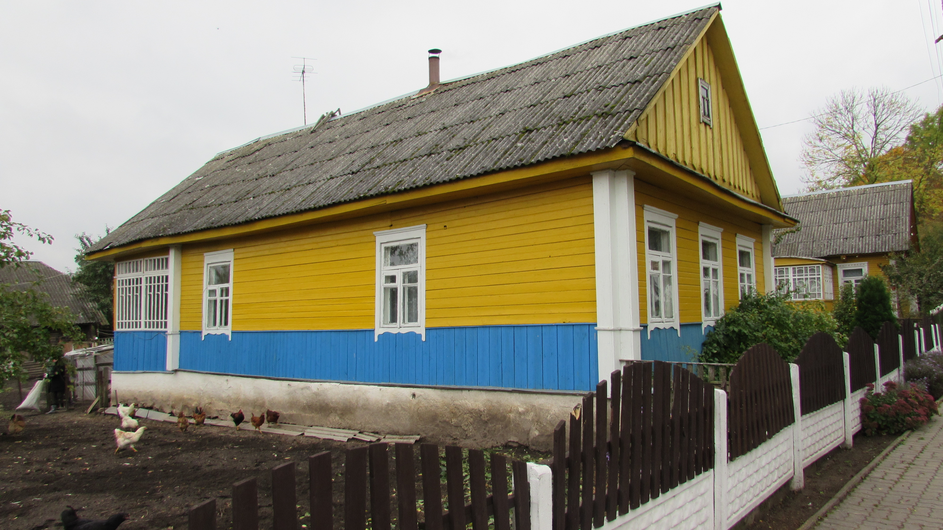 NjaswischHaus